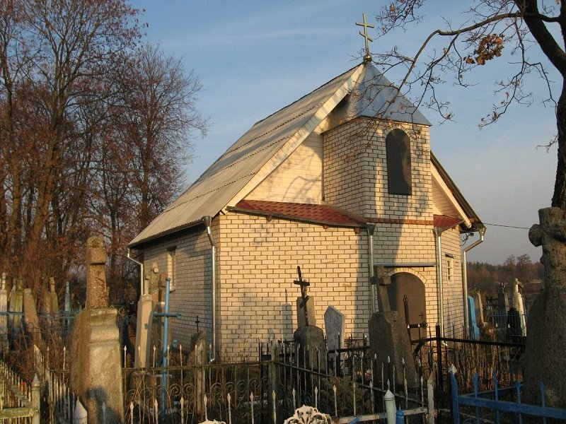 Мясата. Перабудаваная царква Святога Дзмітрыя Салунскага